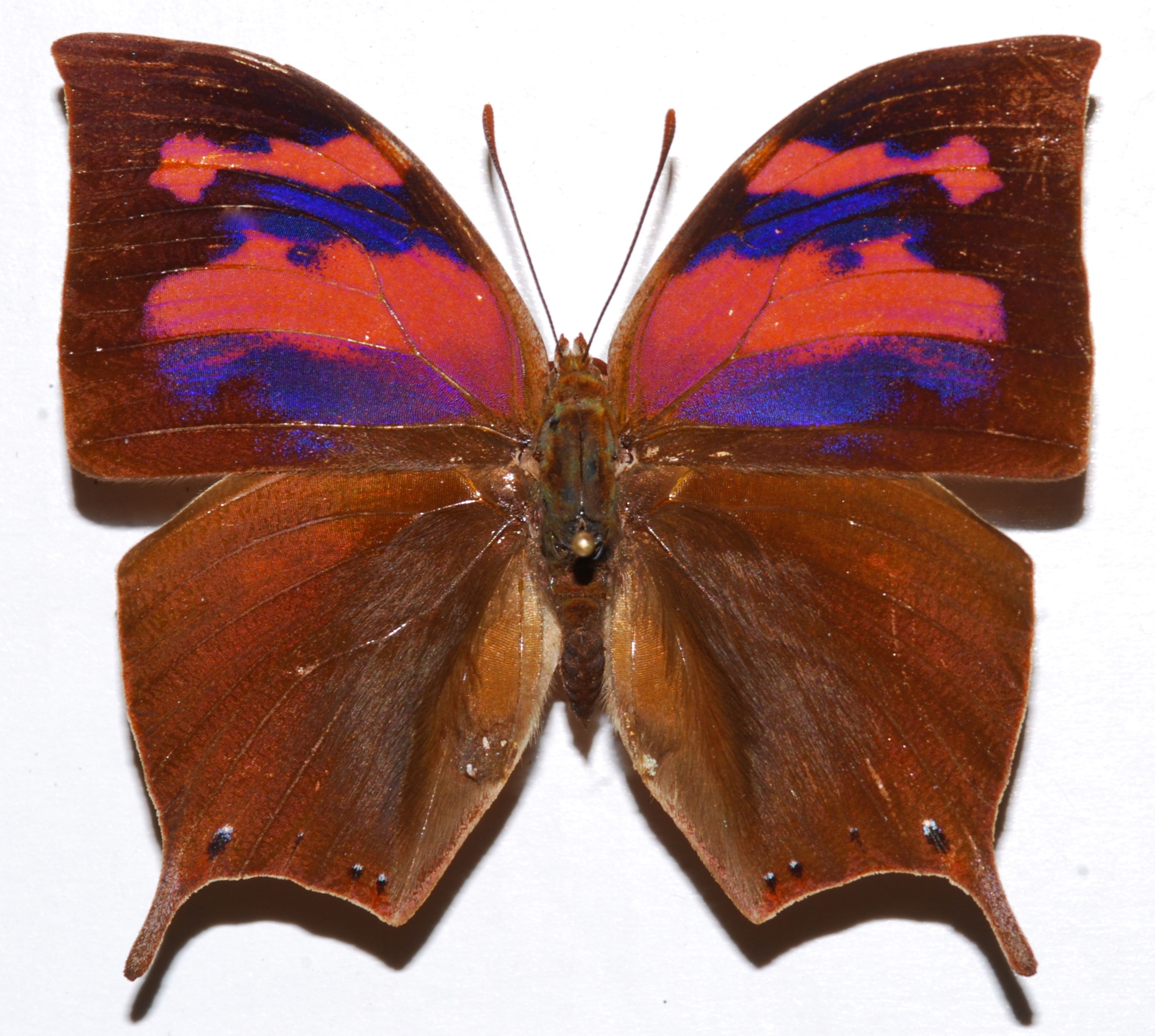 Satipo, PERU